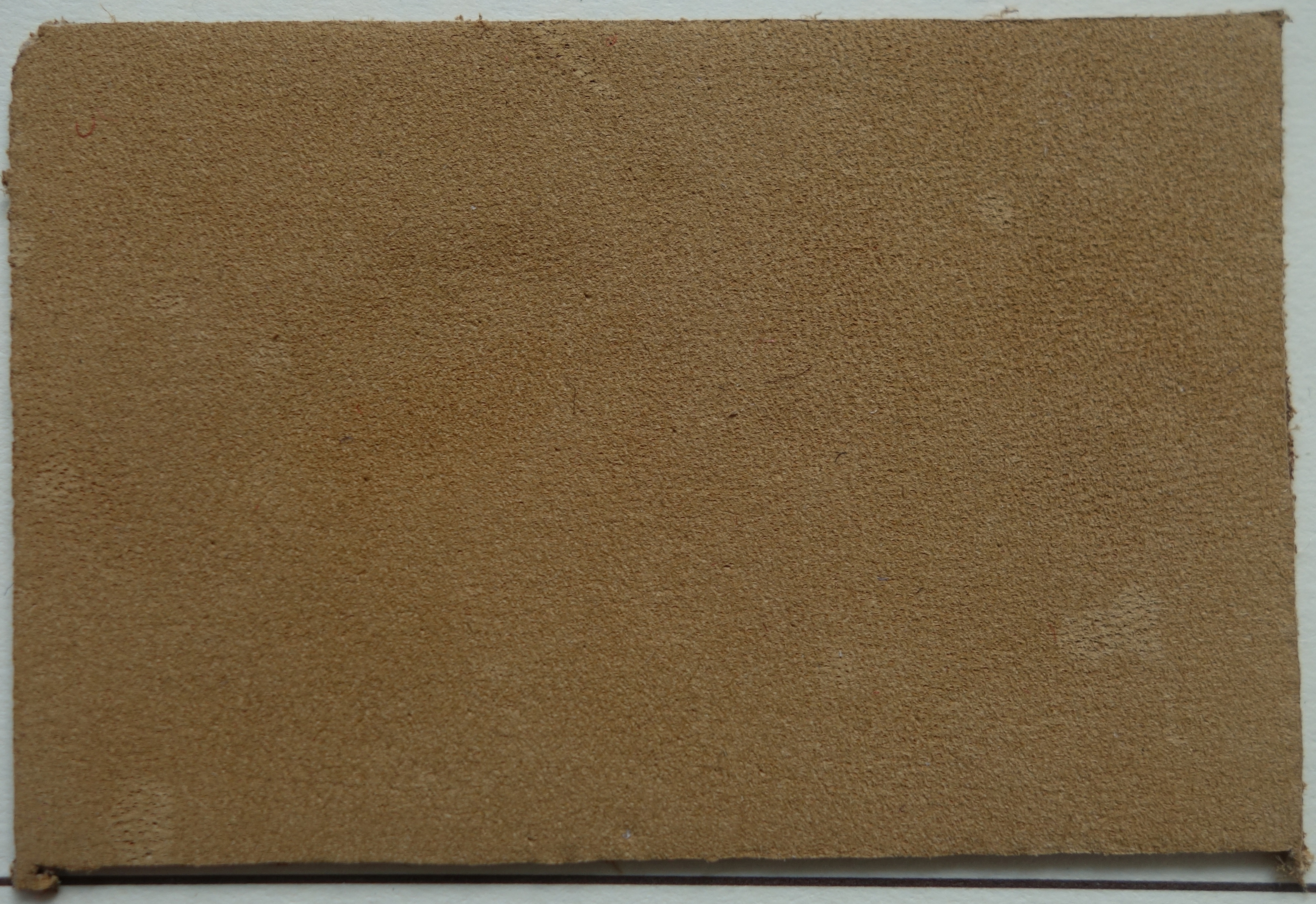 Nubuk-Leder, Musterstück.